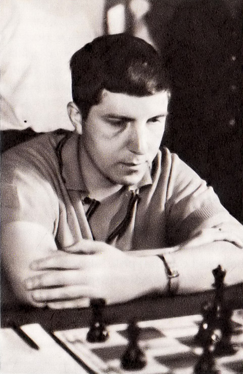 Andrzej Sydor (ur. 3 stycznia 1937 w Lublinie) - polski szachista, mistrz międzynarodowy od 1970 roku.